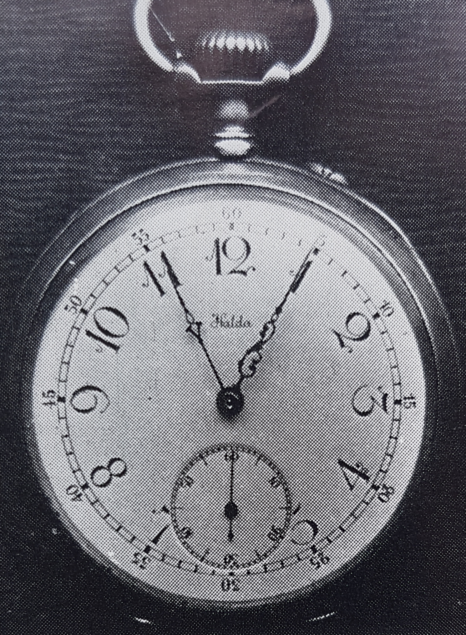 Halda fickur modell S avfotograferad från häftet Något om Haldafabrikens historia